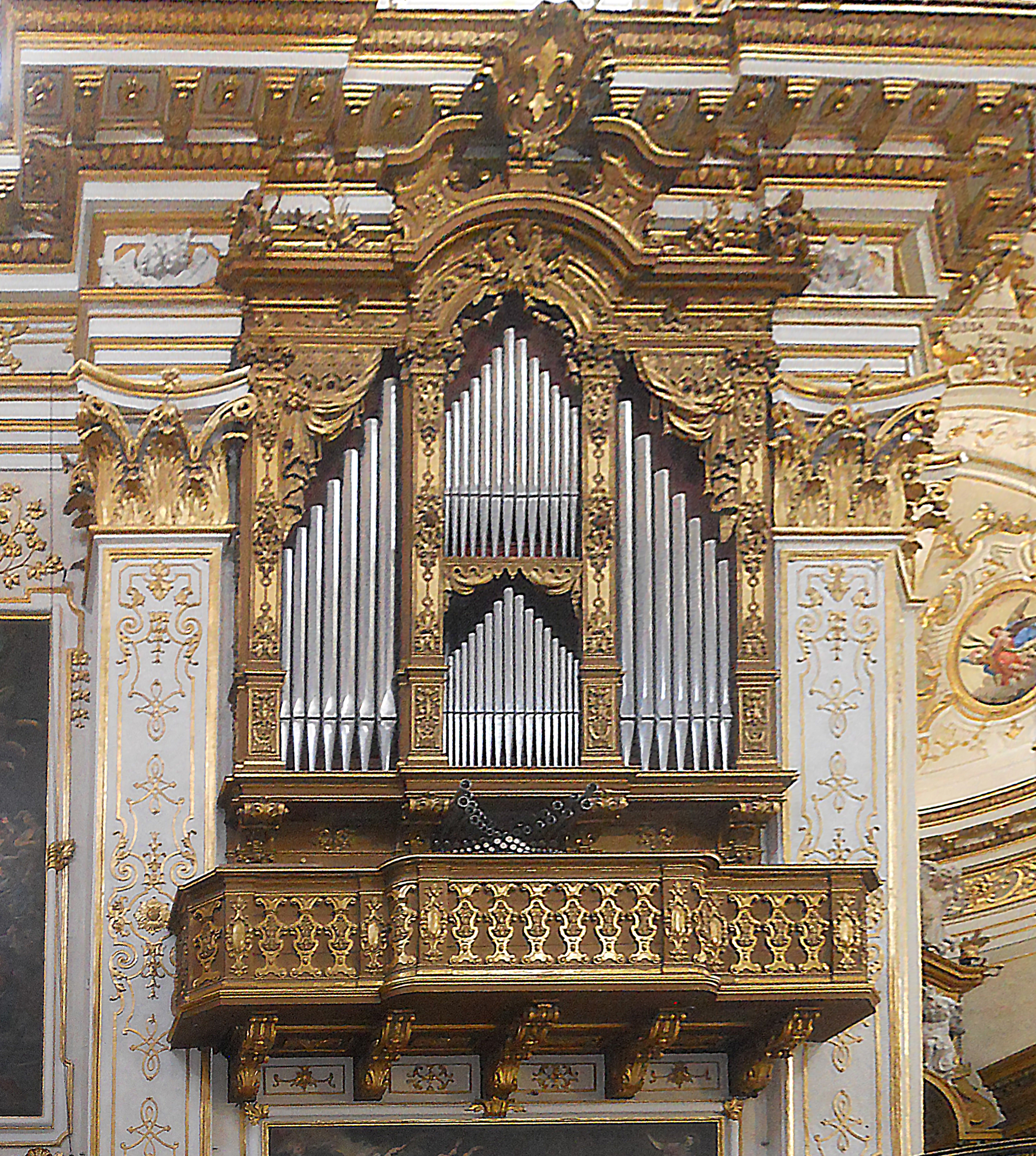 L'organo Pietro Corna (56/IV+P).